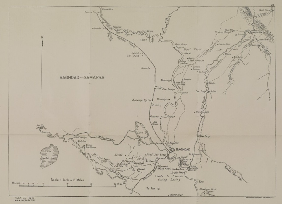 Title ‘23. Baghdad – Samarra’ Description Imprint:Heliozincographed at the Survey of India Offices, Dehra Dun. S.D.O. 3952.Distinctive Features:Relief shown by contours.Sketch map showing the Baghdad Railway line between Baghdad and Samarra with stations marked and labelled for reference. The Decauville Railway south west of Baghdad and a network of canals also shown with position of bridges and a boat ferry indicated. Date 1925/1925 Format 1 map, Dimensions:245 x 346 mm, on sheet 375 x 401 mm Identifier 81055/vdc_100031020437.0x000007_en Language eng Coverage Baghdad Rights